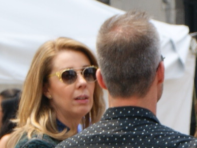 Conductora de programa de espectáculos.